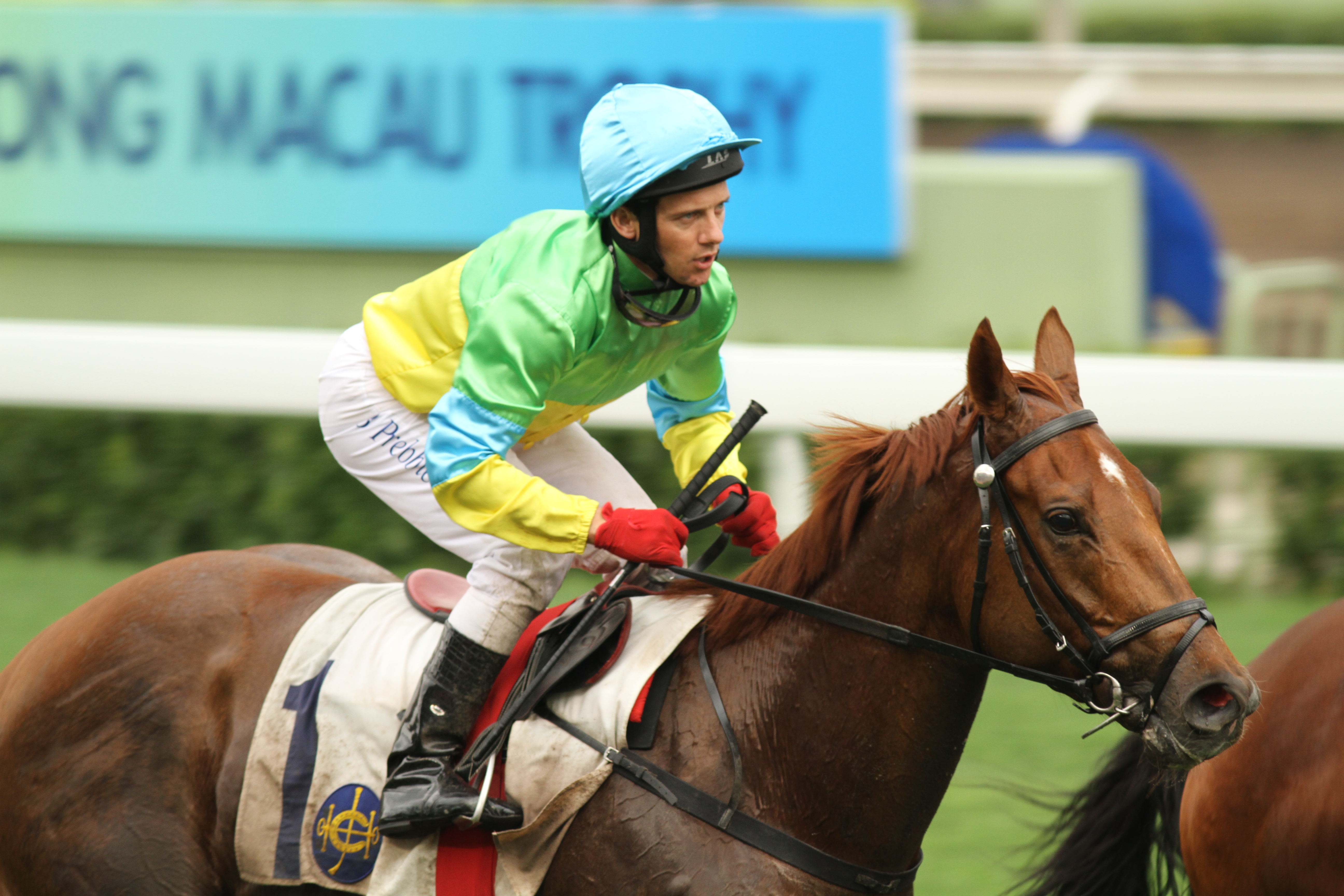 中文（香港）: 香港騎師柏寶，攝於沙田馬場